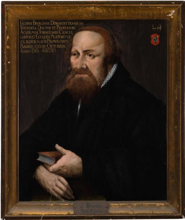 Jakob Beurlin um 1630 auf einem Porträt eines unbekannten Meisters in der Tübinger Professorengalerie